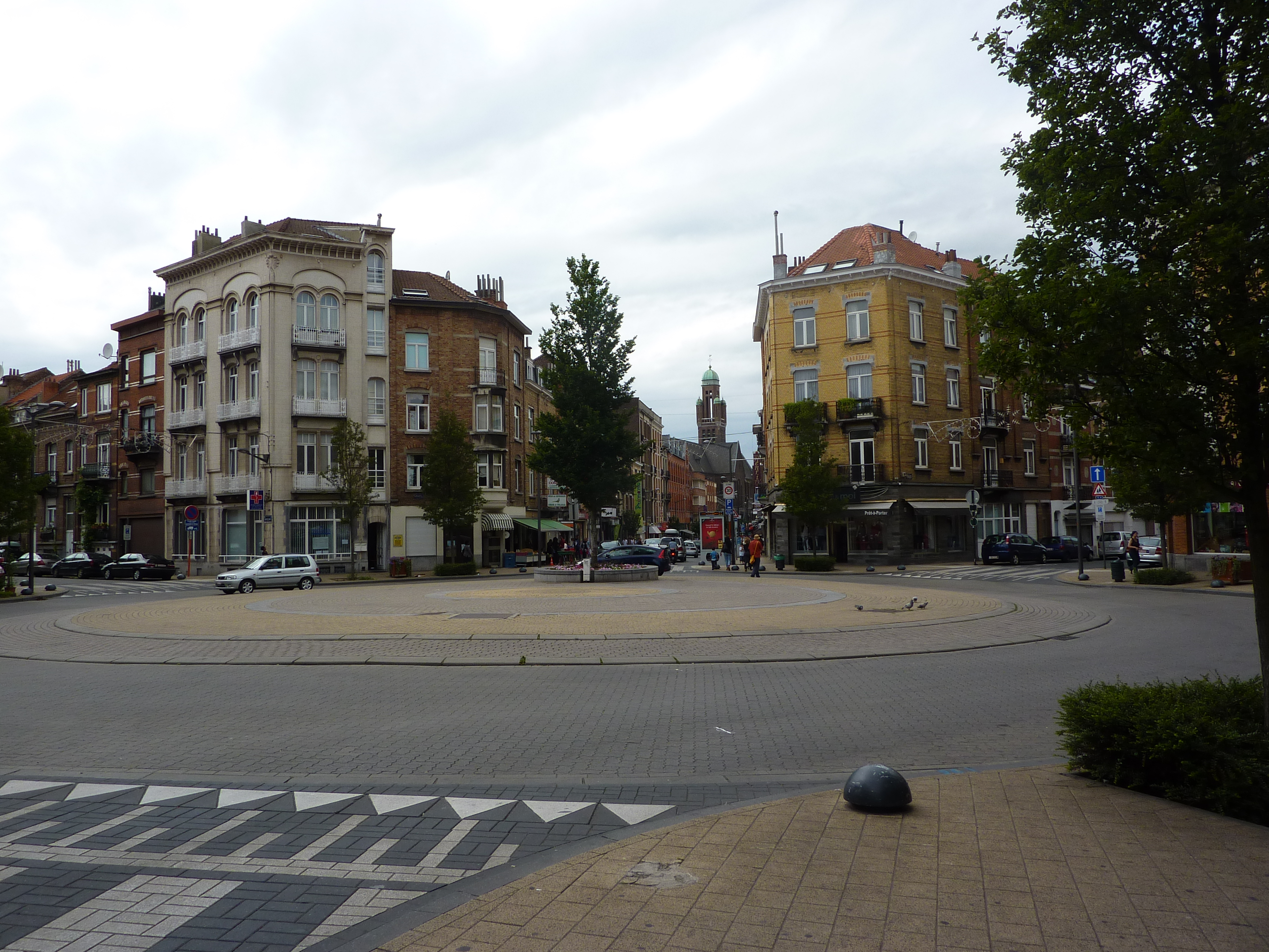 La place de Helmet à Schaerbeek, Bruxelles, Belgique.